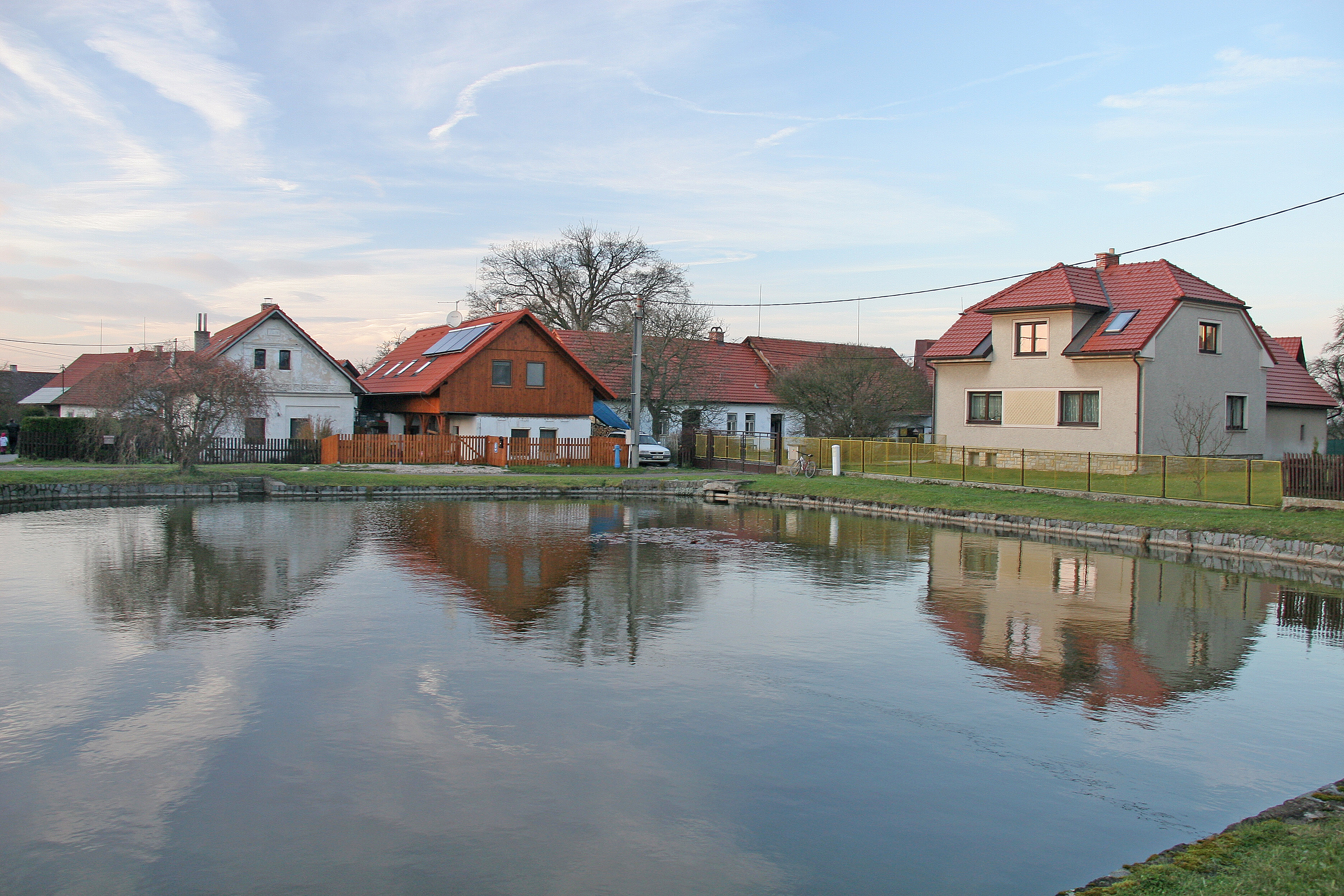 Nová Ves návesní rybník